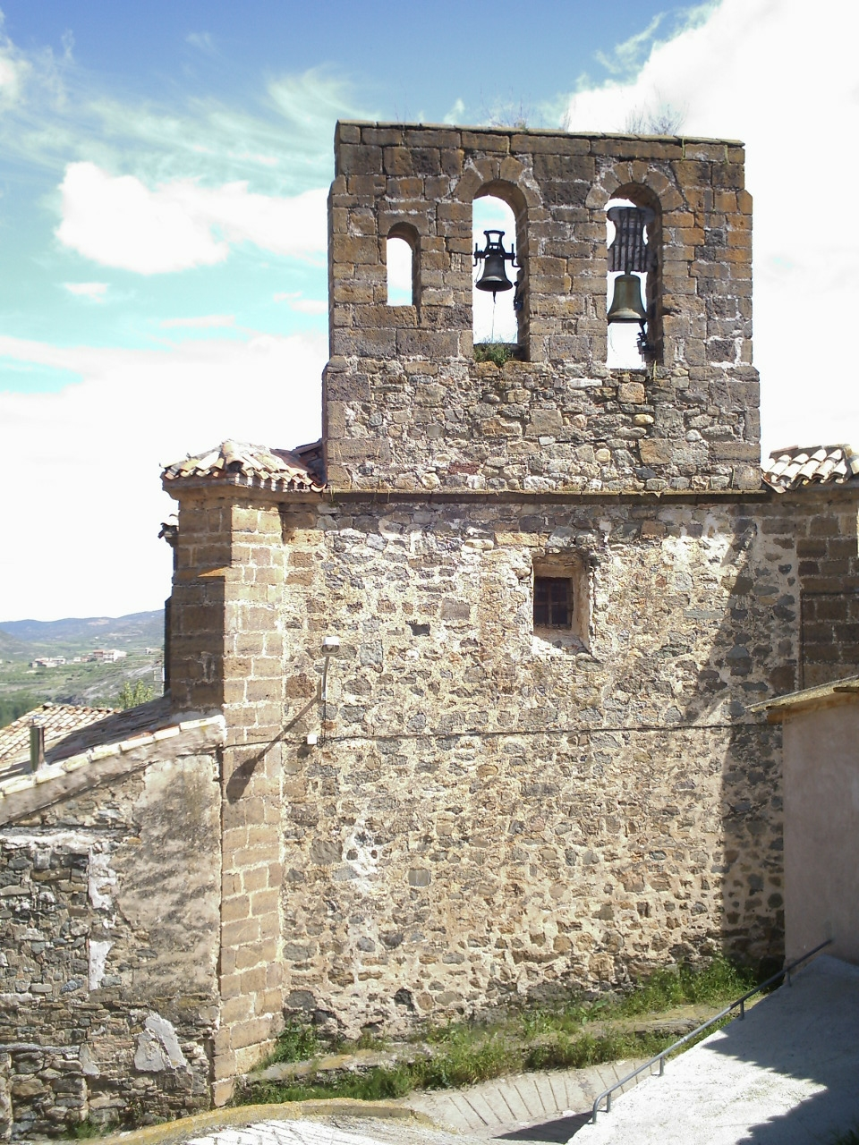 Valdeperillo, La Rioja (España)